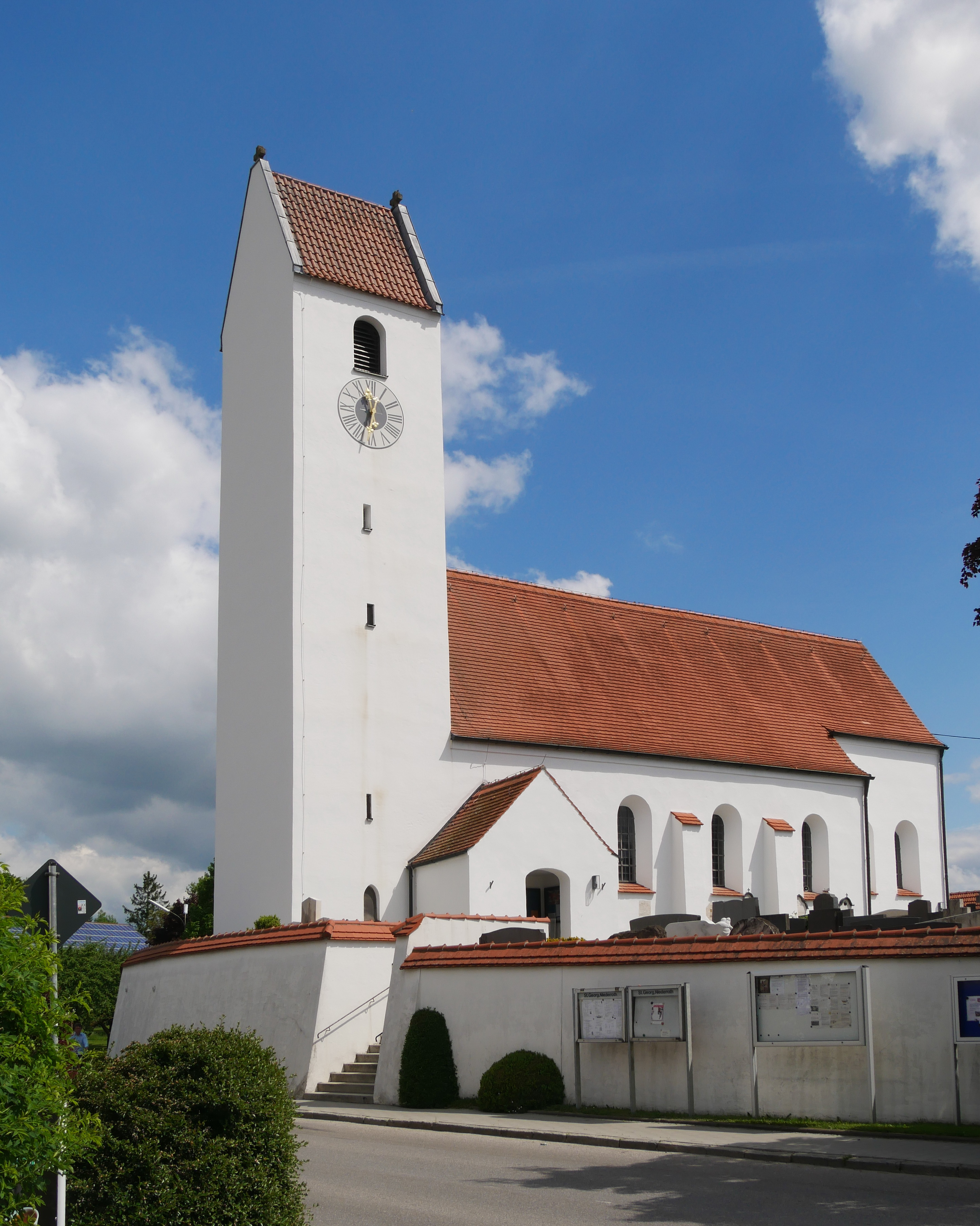 Niederroth (Gde. Markt Indersdorf), Münchner Str. 19: Katholische Pfarrkirche St. Georg. Ansicht von SW